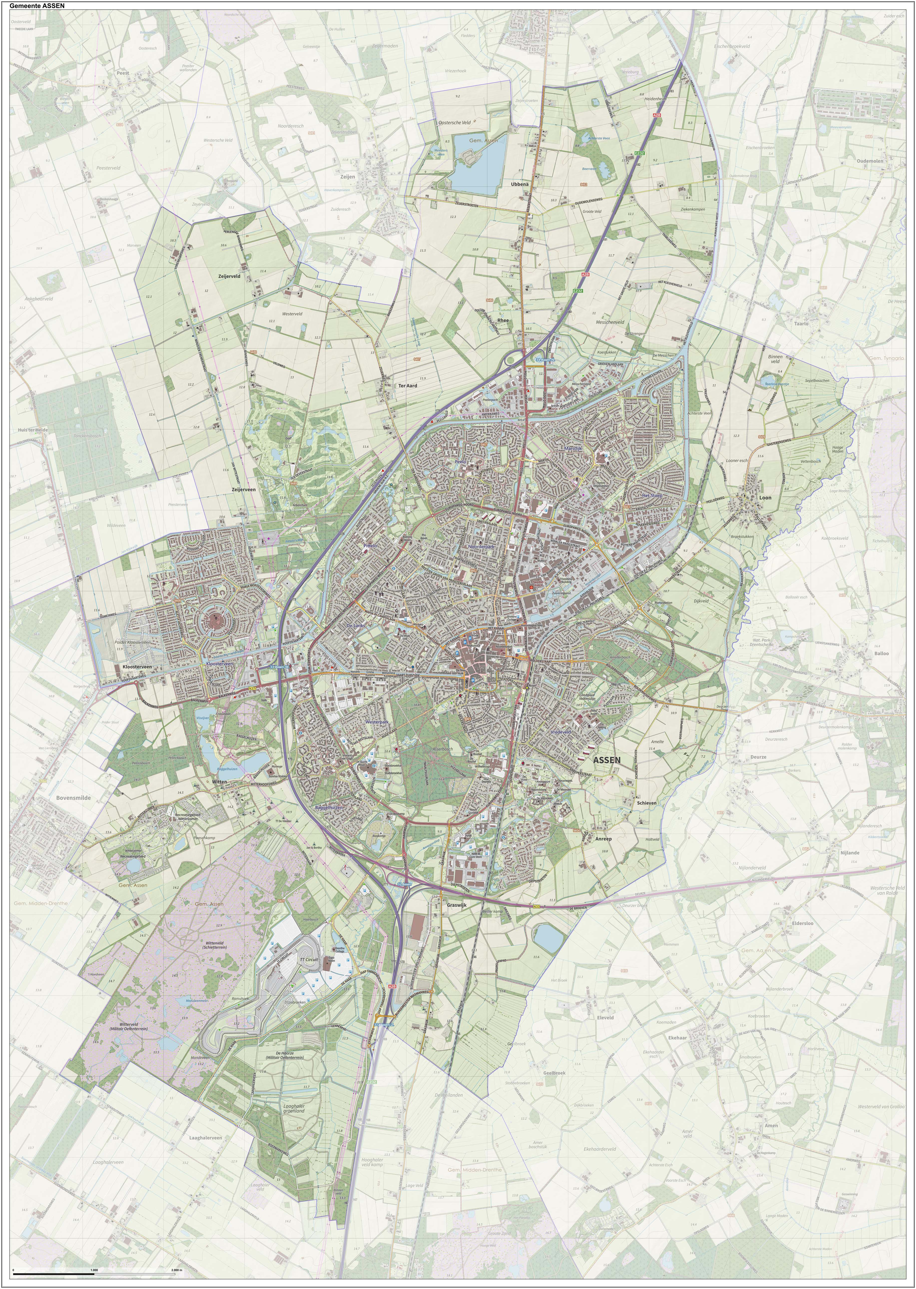 Topografische gemeentekaart. Resolutie: 400 pixels/km. Kaartbeeld samengesteld uit de open geodata van de Top10NL en Top25namen (Kadaster), Creative Commons-BY licentie. Gebouwvlakken uit open geodata BAG extract. Wegen uit de OpenStreetMap, OpenStreetMap community. Reliëfschaduw uit de Actuele Hoogtekaart AHN2. Samenstelling en kleurenschema: Jan-Willem van Aalst, met QGIS. Zie ook de Legenda.